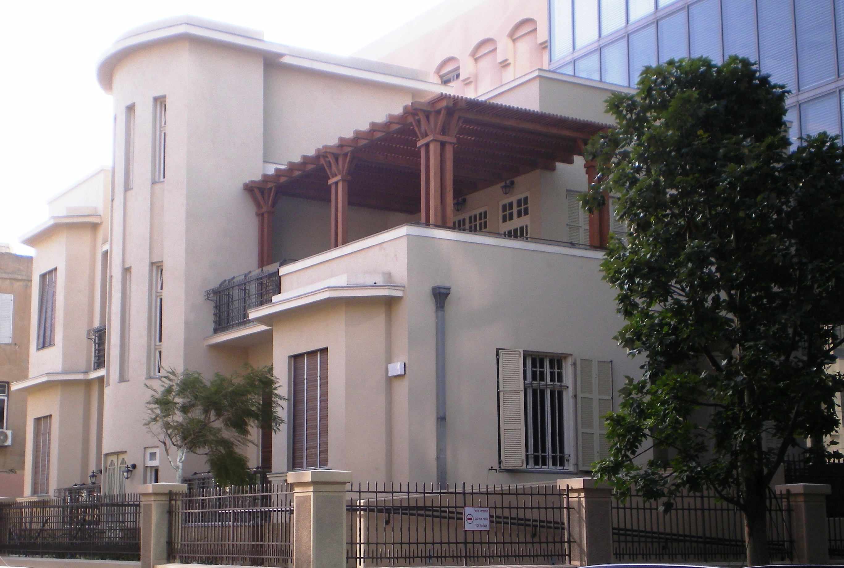 בית רבקה גרינוולד, מבט מכיוון צפון-מזרח